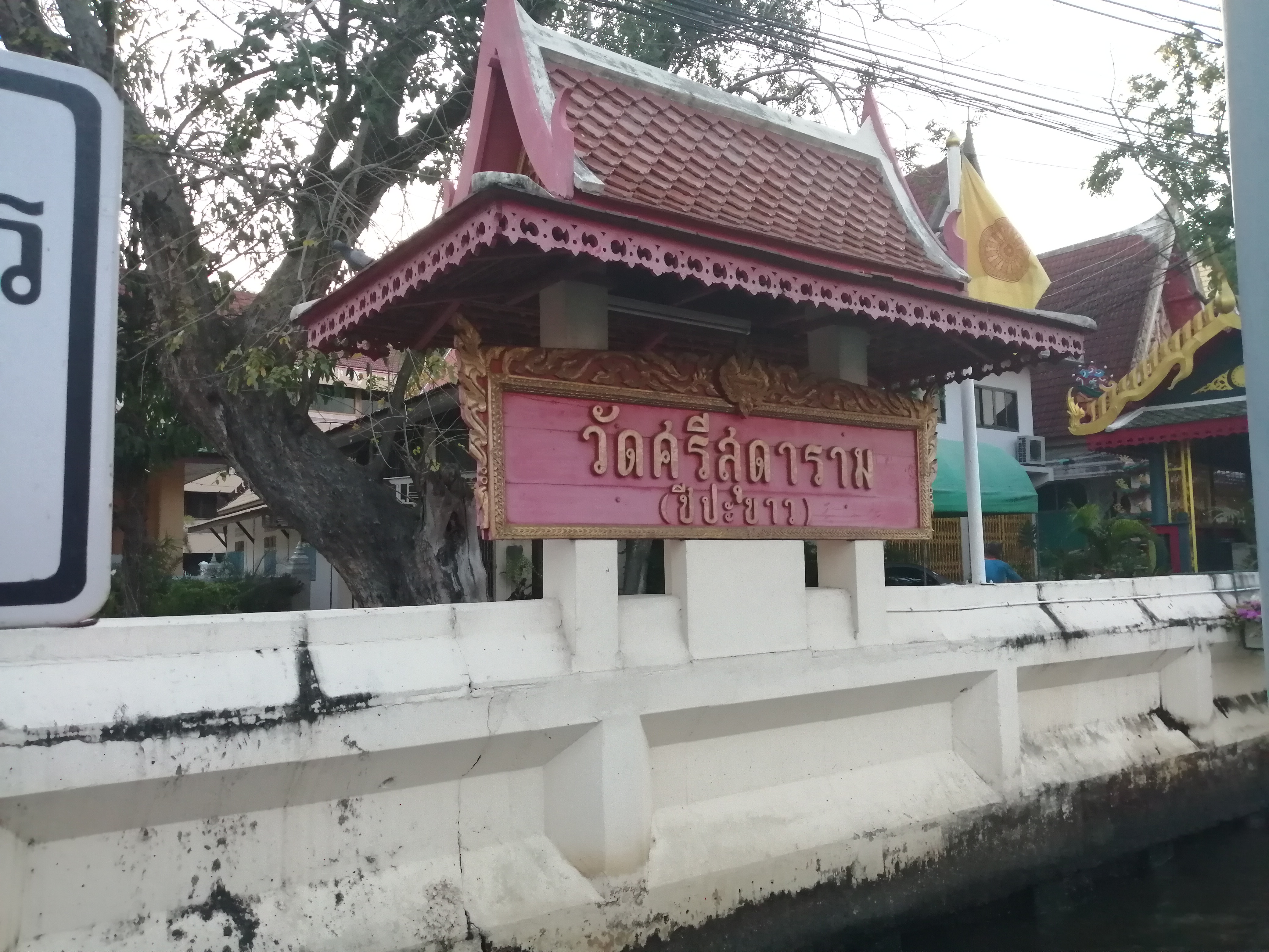 ป้ายวัดศรีสุดาฯ